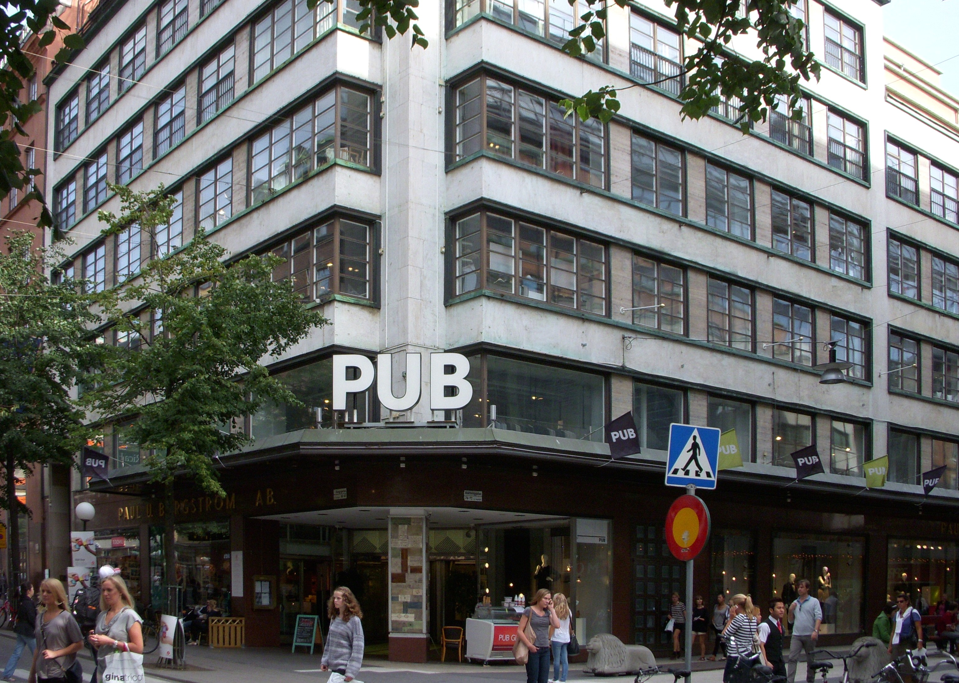 Varuhuset PUB, Drottninggatan, Stockholm. Tillbyggnad uppförd 1929-1930 efter ritningar av Ove Gormsen vid Allan Christensen & Co AB